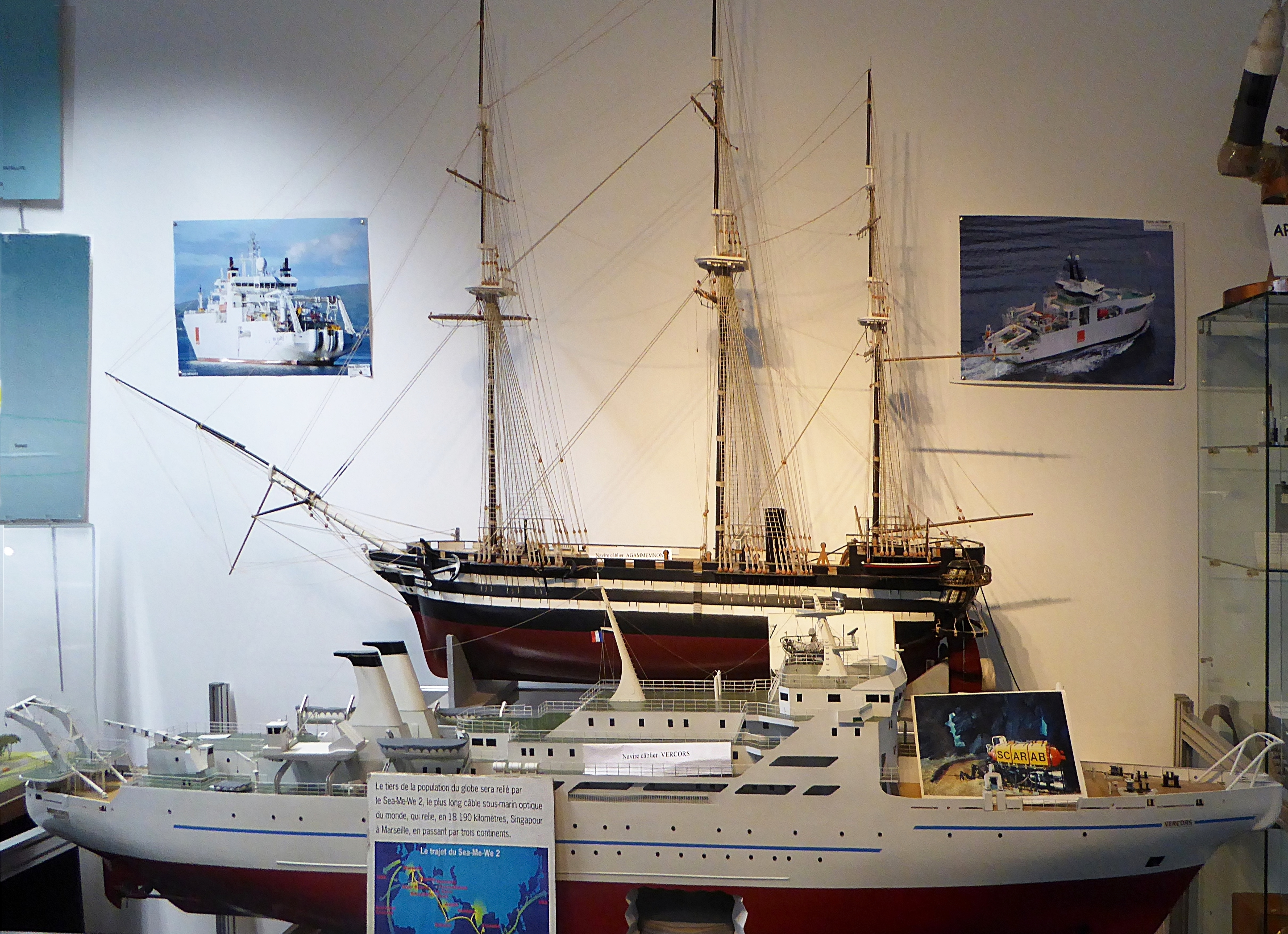 Maquettes des navires câbliers "Vercors" et "HMS Agamemnon".- Musée régional des télécommunications en Flandres, Marcq-en-Barœul, Nord.- France